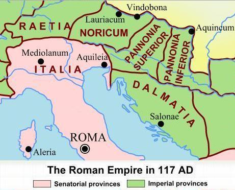 utilizzata in